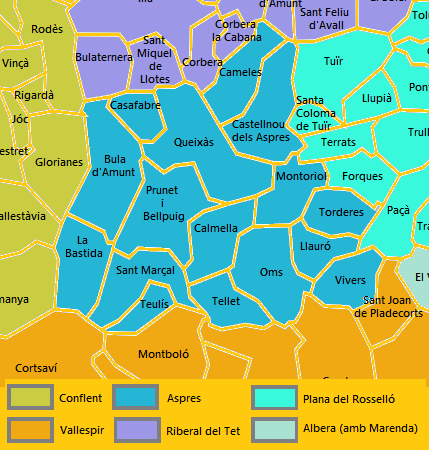 Mapa dels Aspres elaborat a partir d'un mapa de lliure disposició